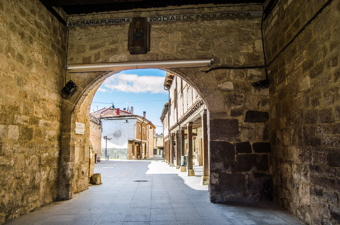 Villadiego. Puerta de la villa en la antigua muralla o arco de la cárcel.